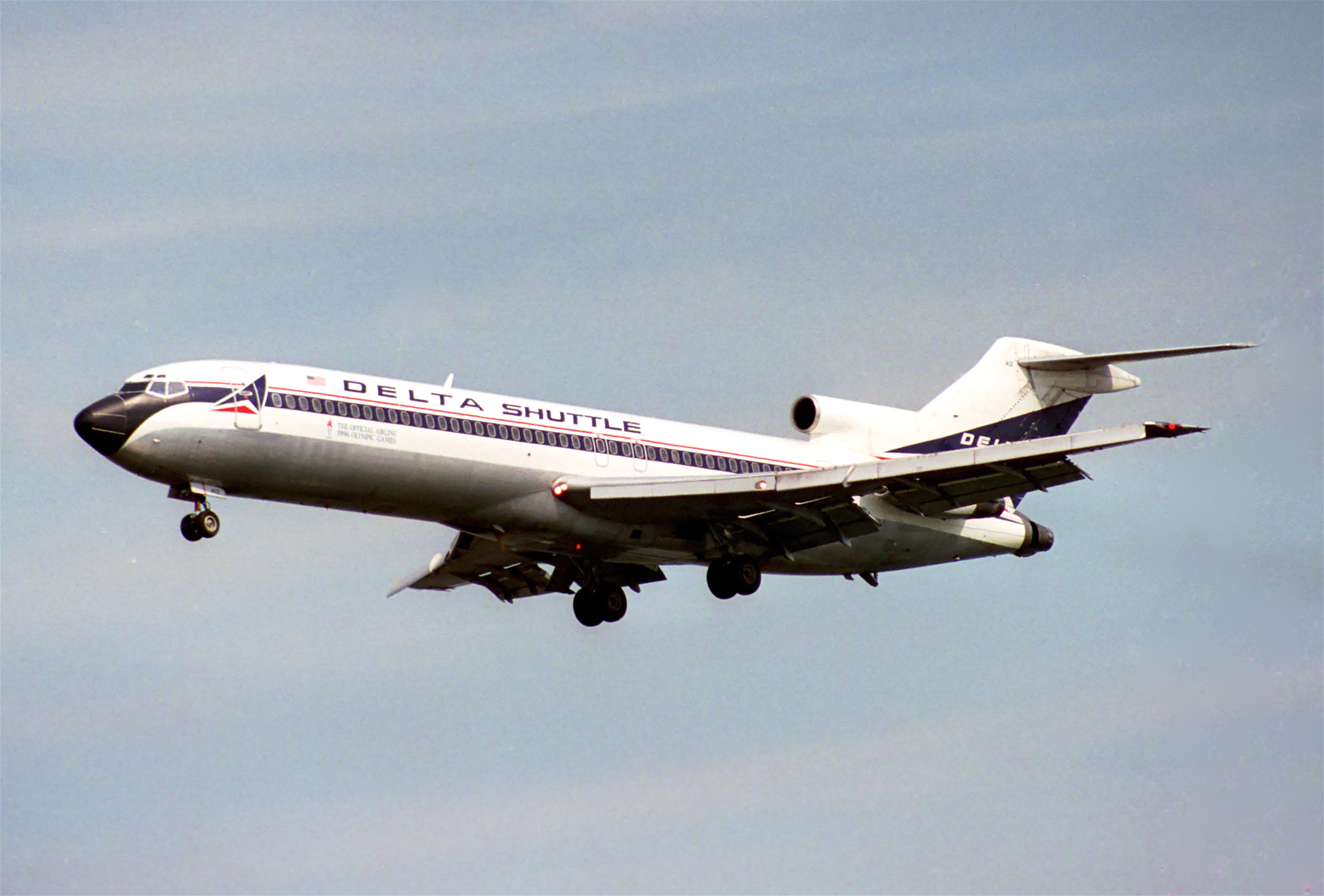 Delta Shuttle Boeing 727-232; N412DA@DCA;19.07.1995